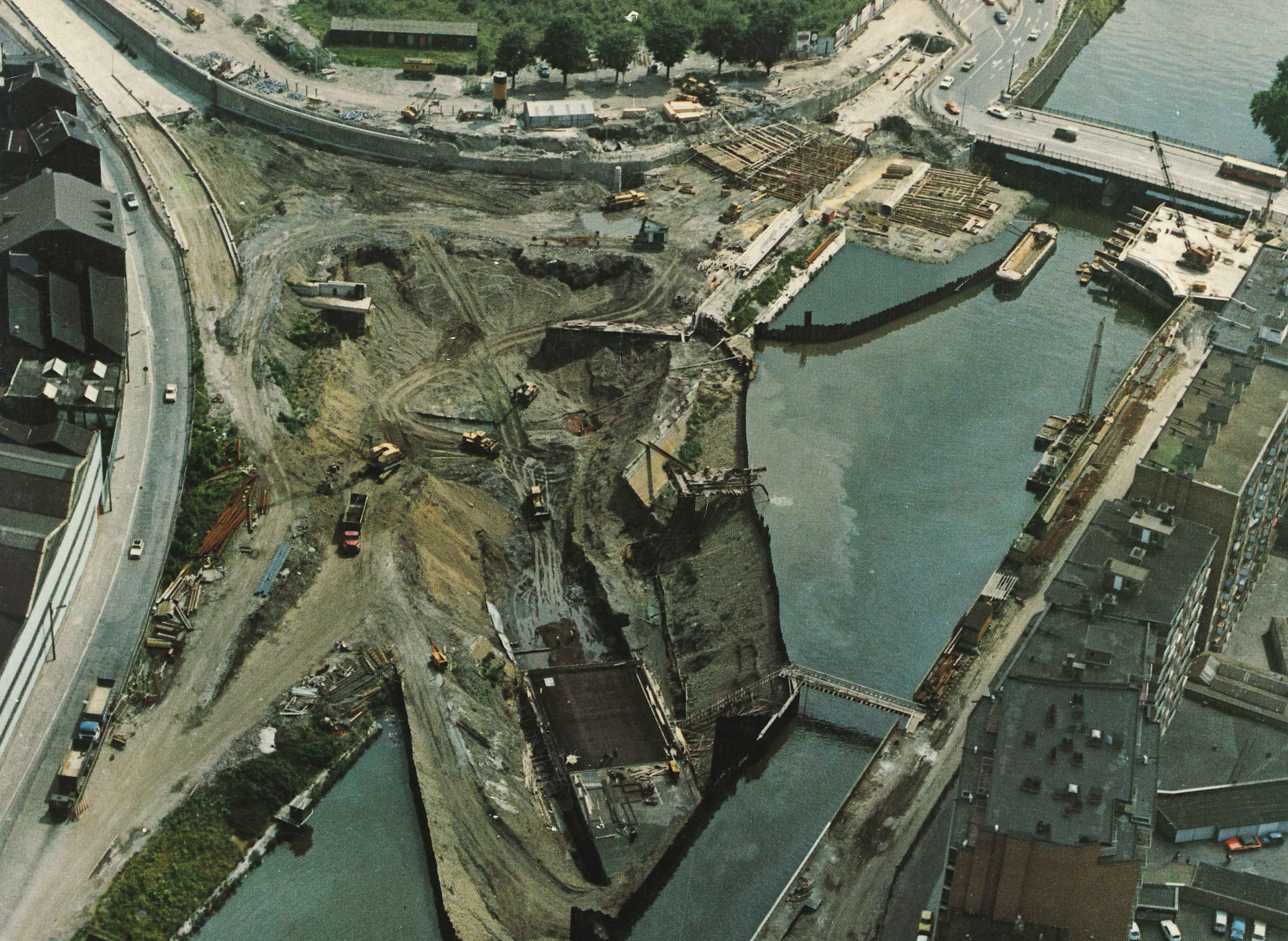 Vue aérienne des travaux de construction du tunnel sous la Dérivation à Liège Rive droite (côté Londoz) Année présumée : 1976-1977